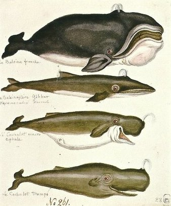 Михайлов Павел Николаевич - Киты и кашалоты